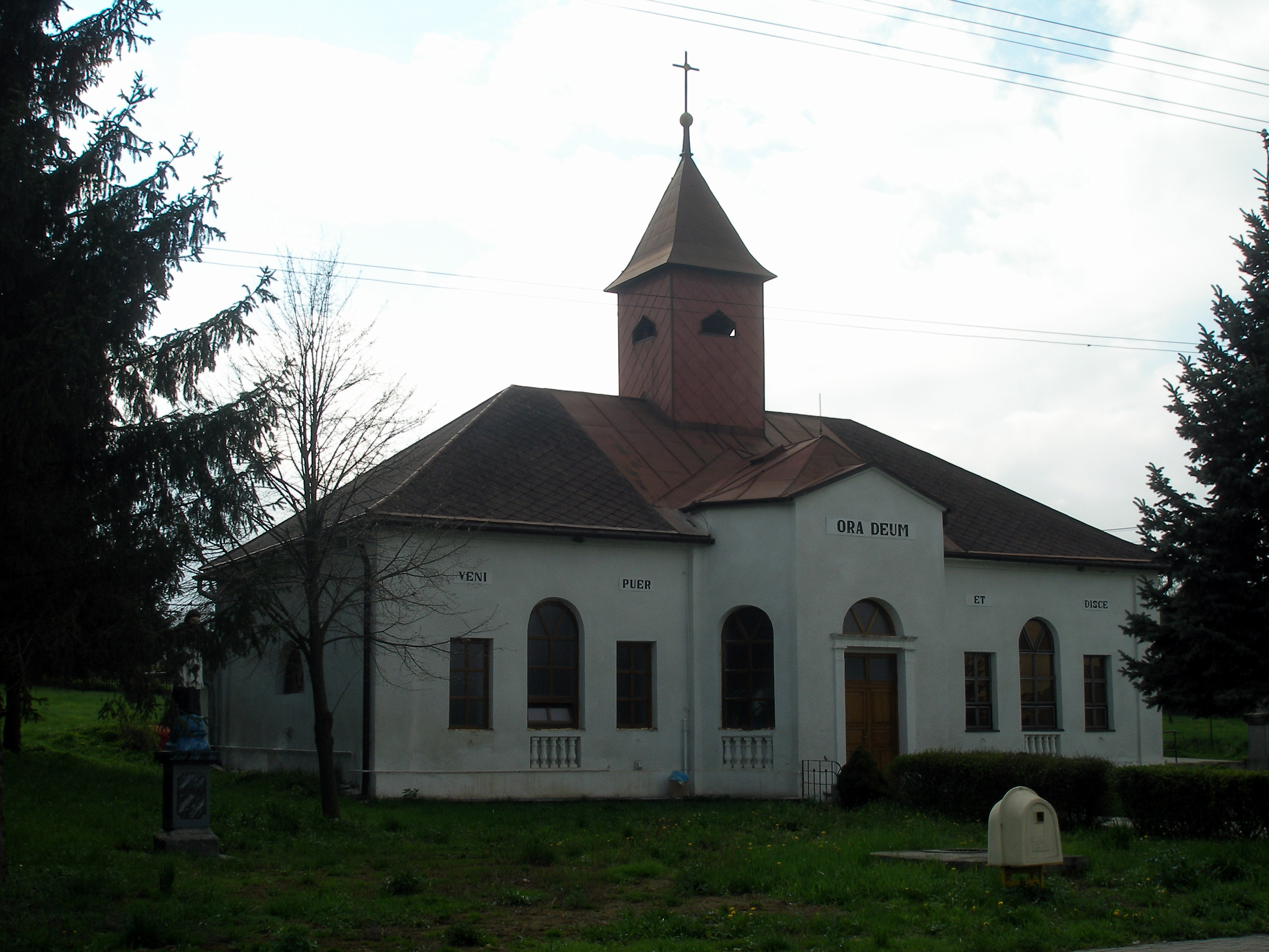 Obec Lemešany okres Prešov región Šariš